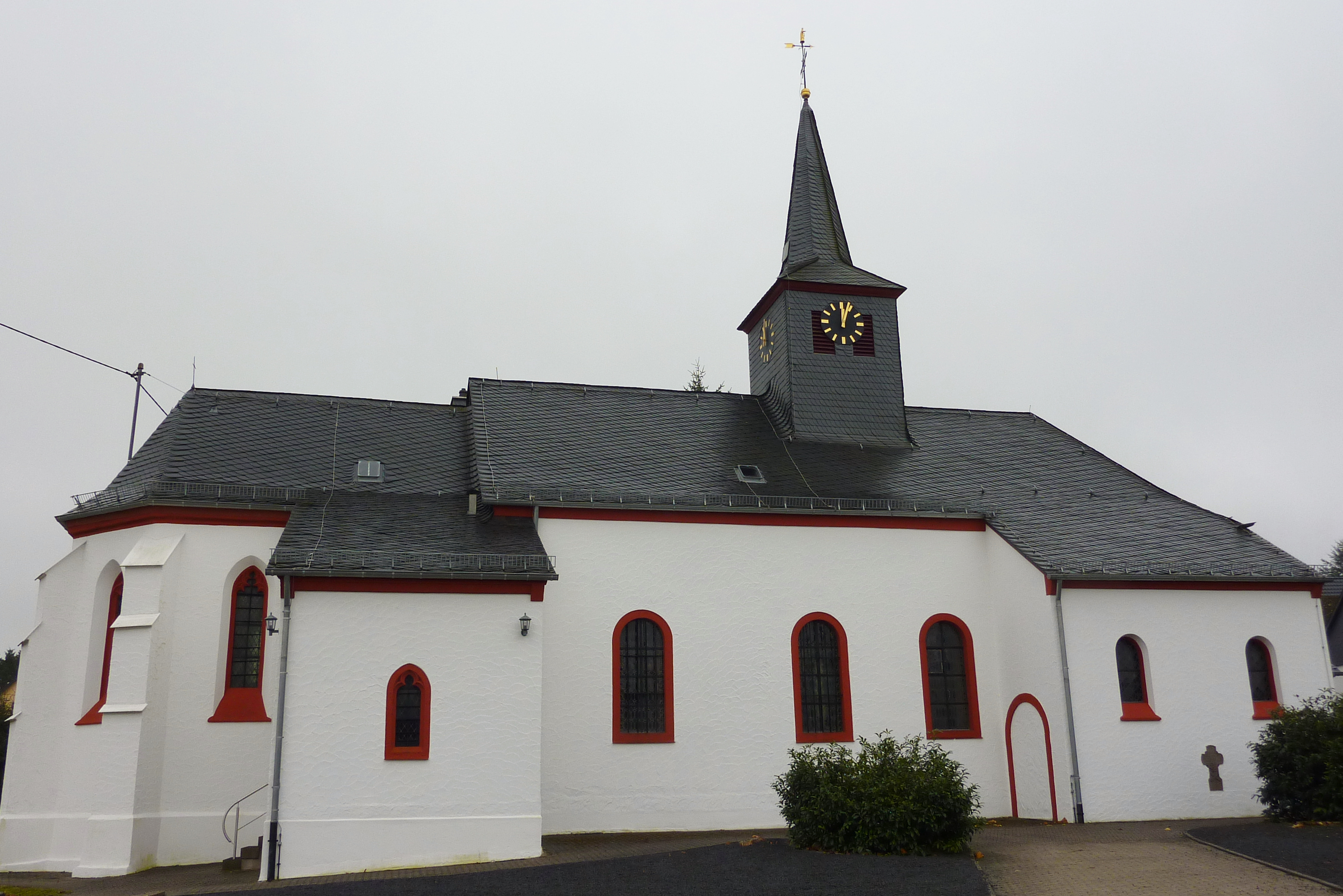 Katholische Pfarrkirche St. Nikolaus in Nürburg, Außenansicht